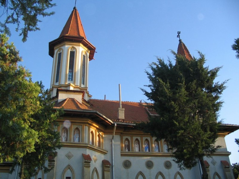 fotografia îmi aparţine